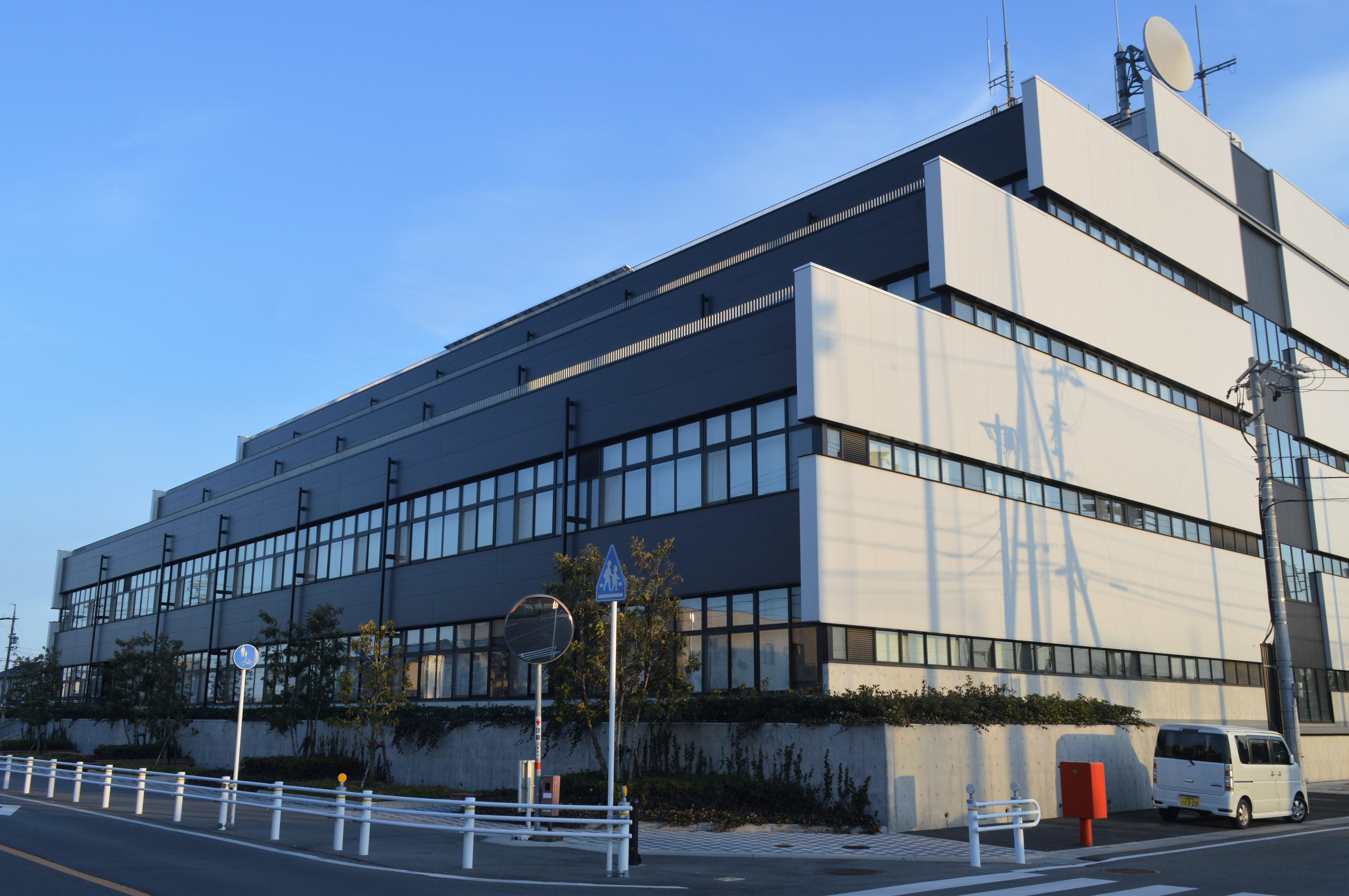 愛知県愛西市の愛西市役所。